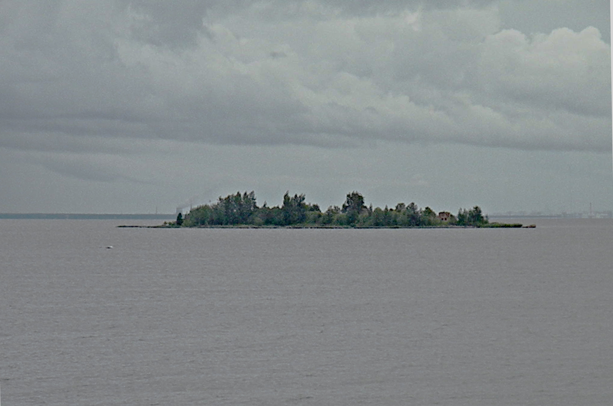 Fort_Nr._1._Kronstadt.